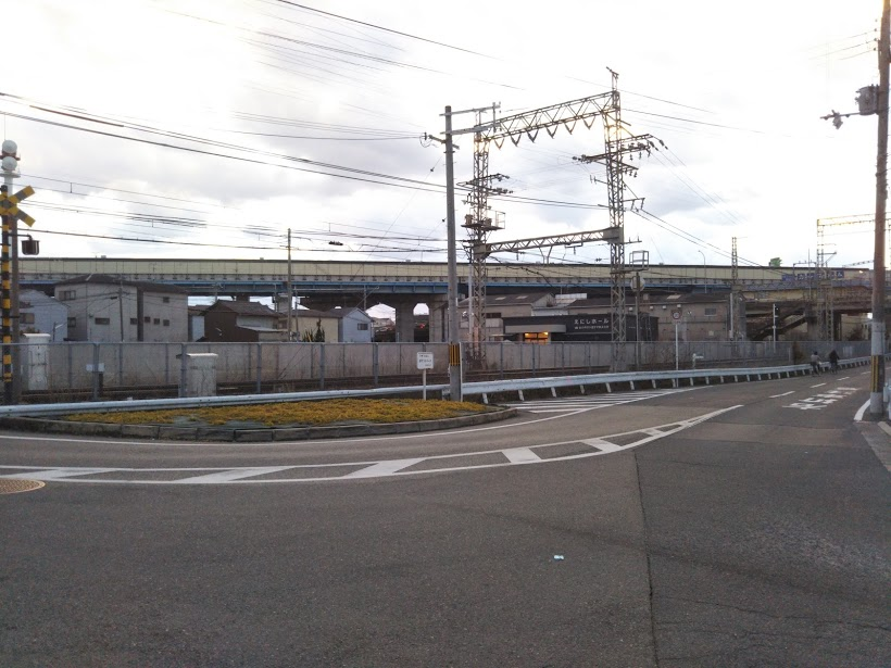 応神御陵前駅の跡地(2018年1月撮影) 駅舎の痕跡は残ってないが、踏切前の道が大きく膨らんでいる。